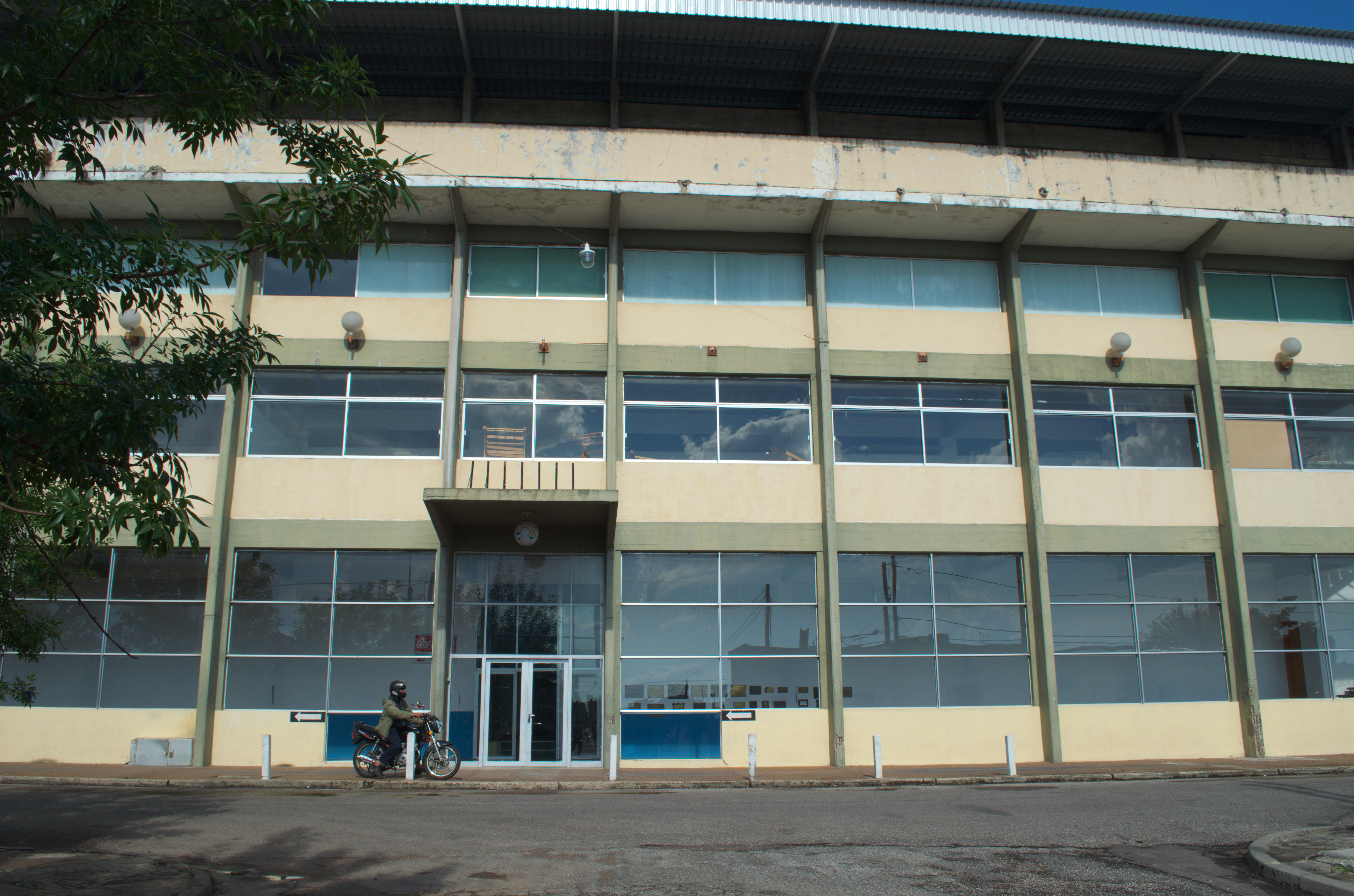 Imagen de la fachada de la tribuna principal del Estadio Parque Artigas de Paysandú